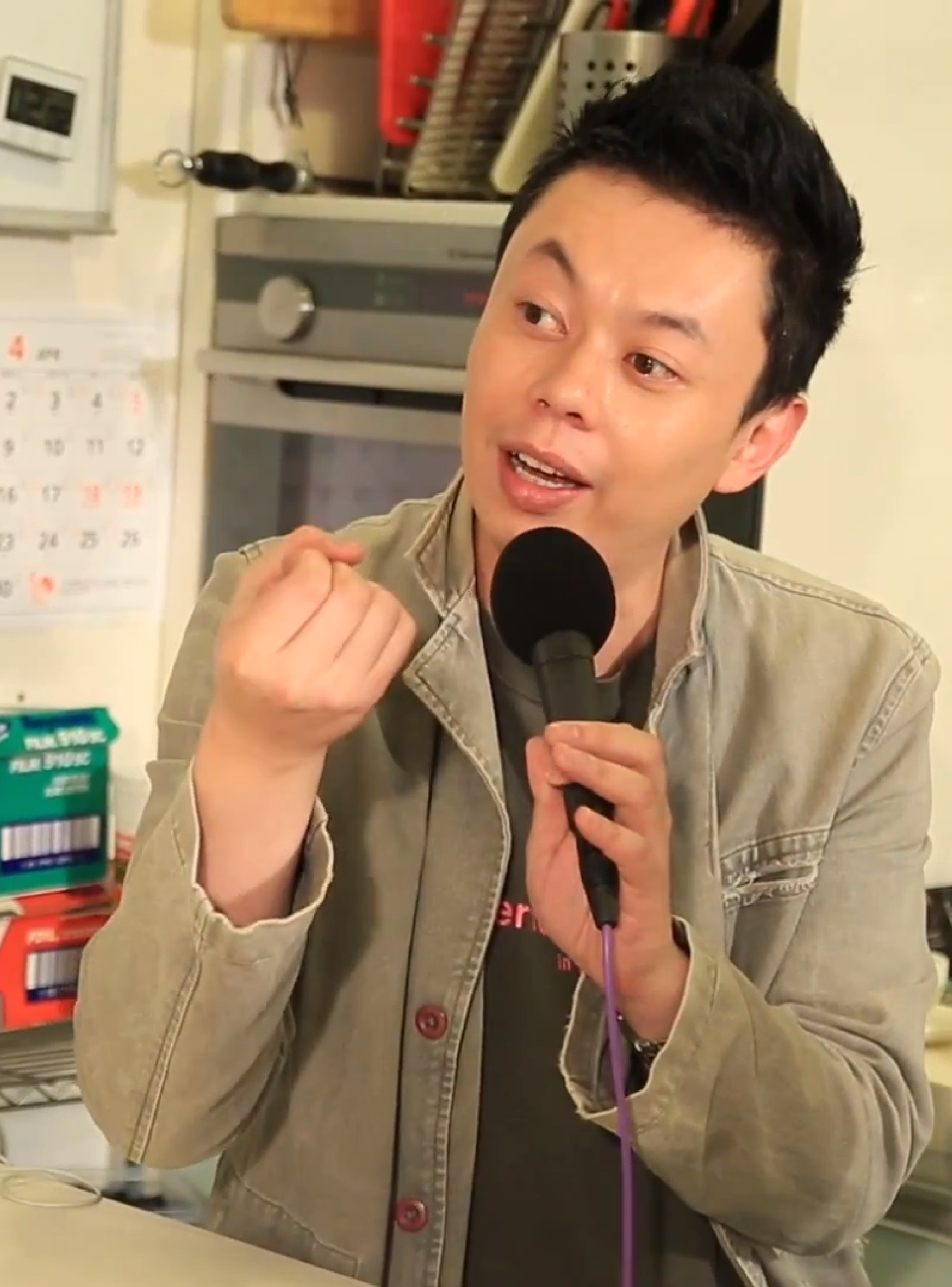 中文（香港）: 香港男藝人及商人，為前保安局局長李少光之子